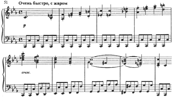 Патетичная соната. Главная партия